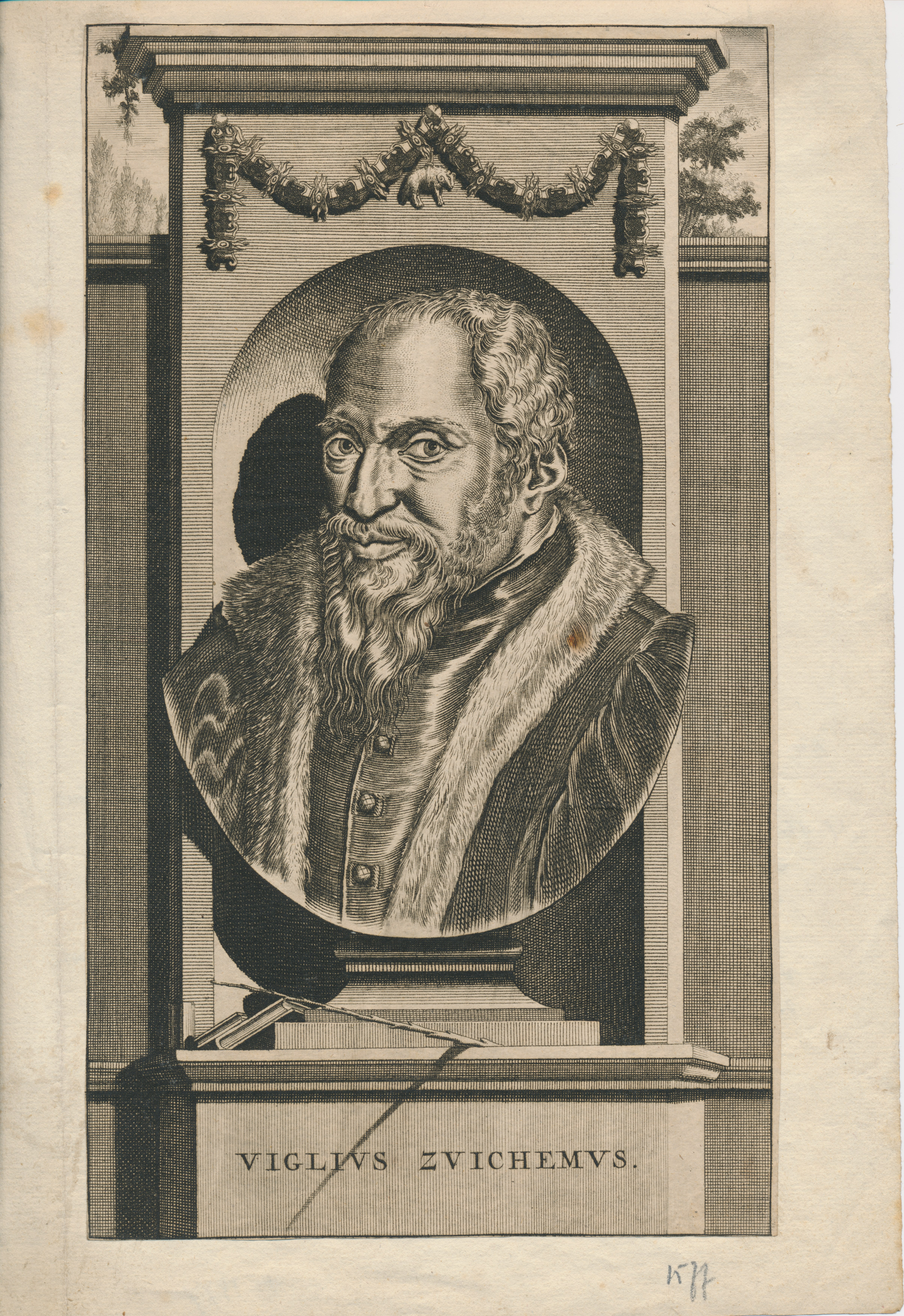 Viglius 1507-1577